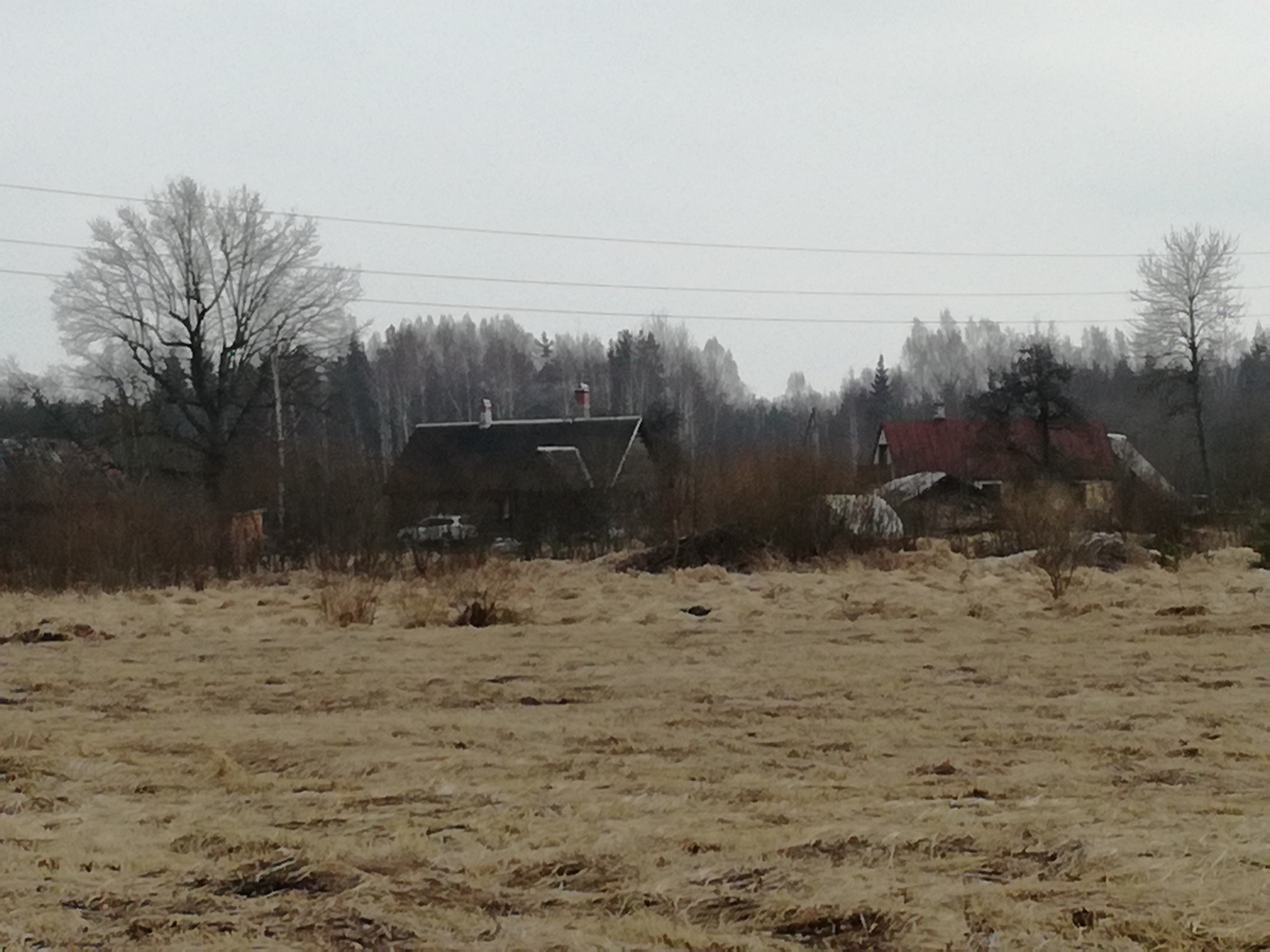 Čaukciema apbūve